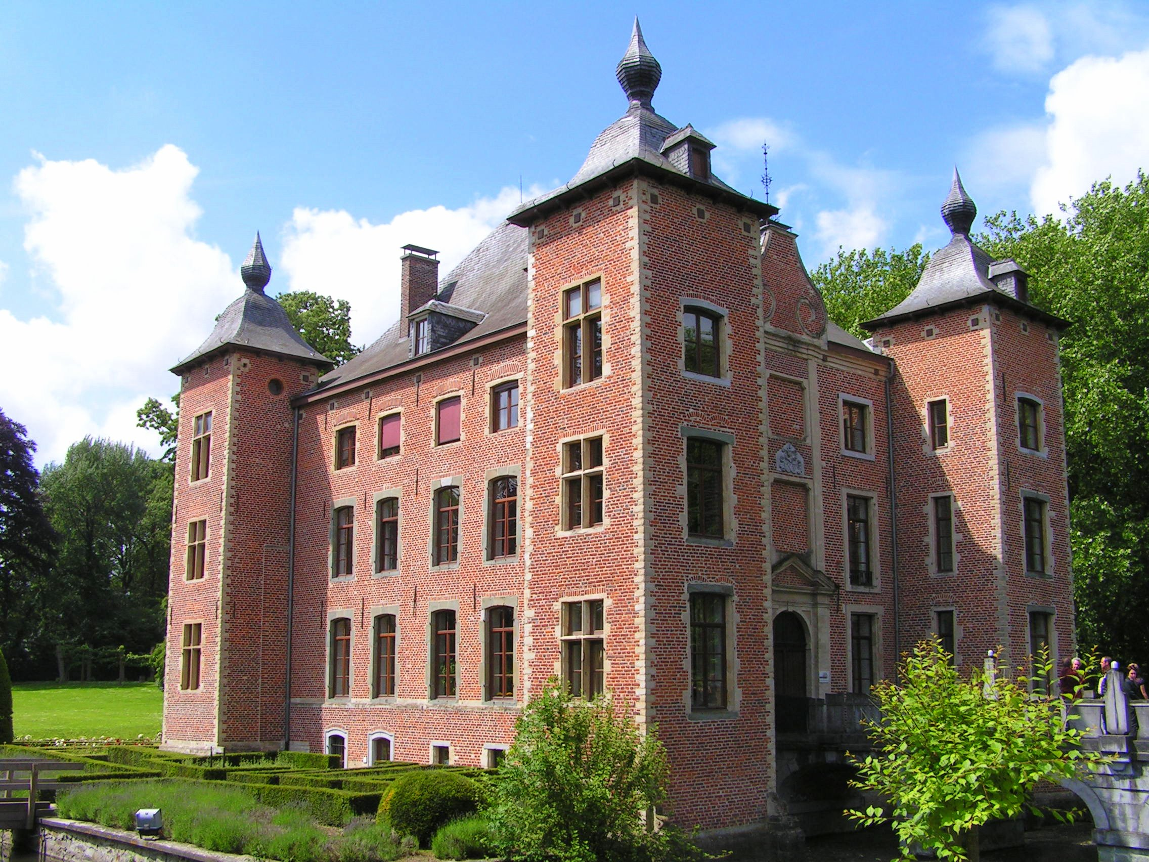 Coloma Castle, Sint-Pieters-Leeuw, Belgium